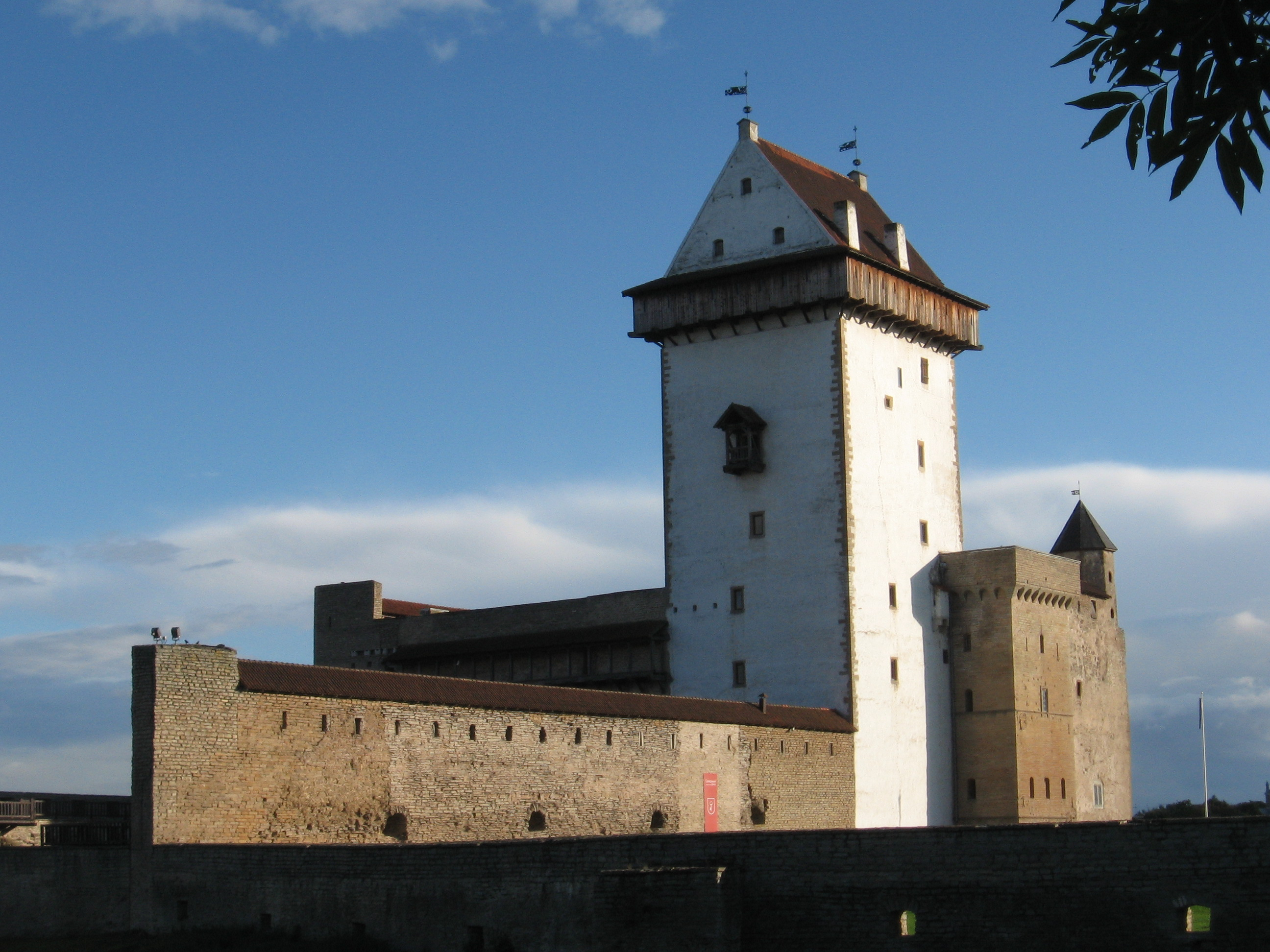 Narva Hermanni linnus